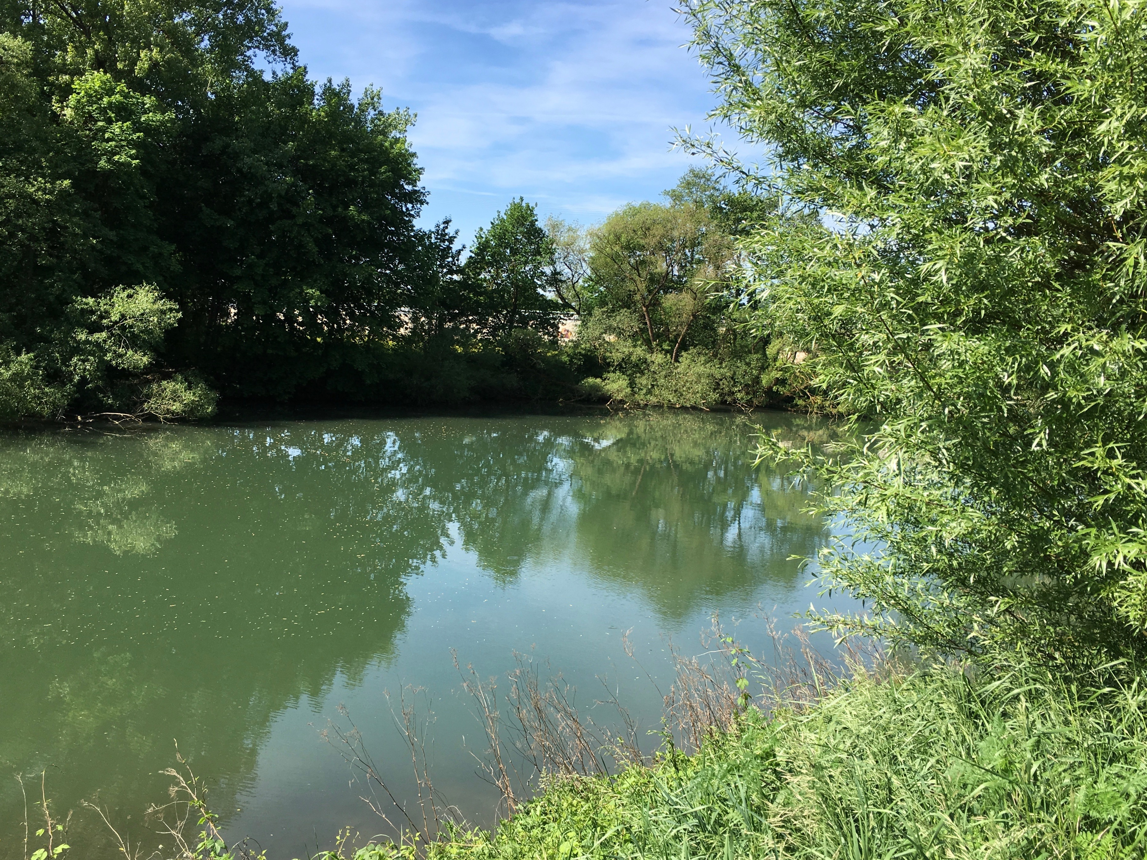 (LSG:BY-LSG-00081.02)_LSG Regnitzauen